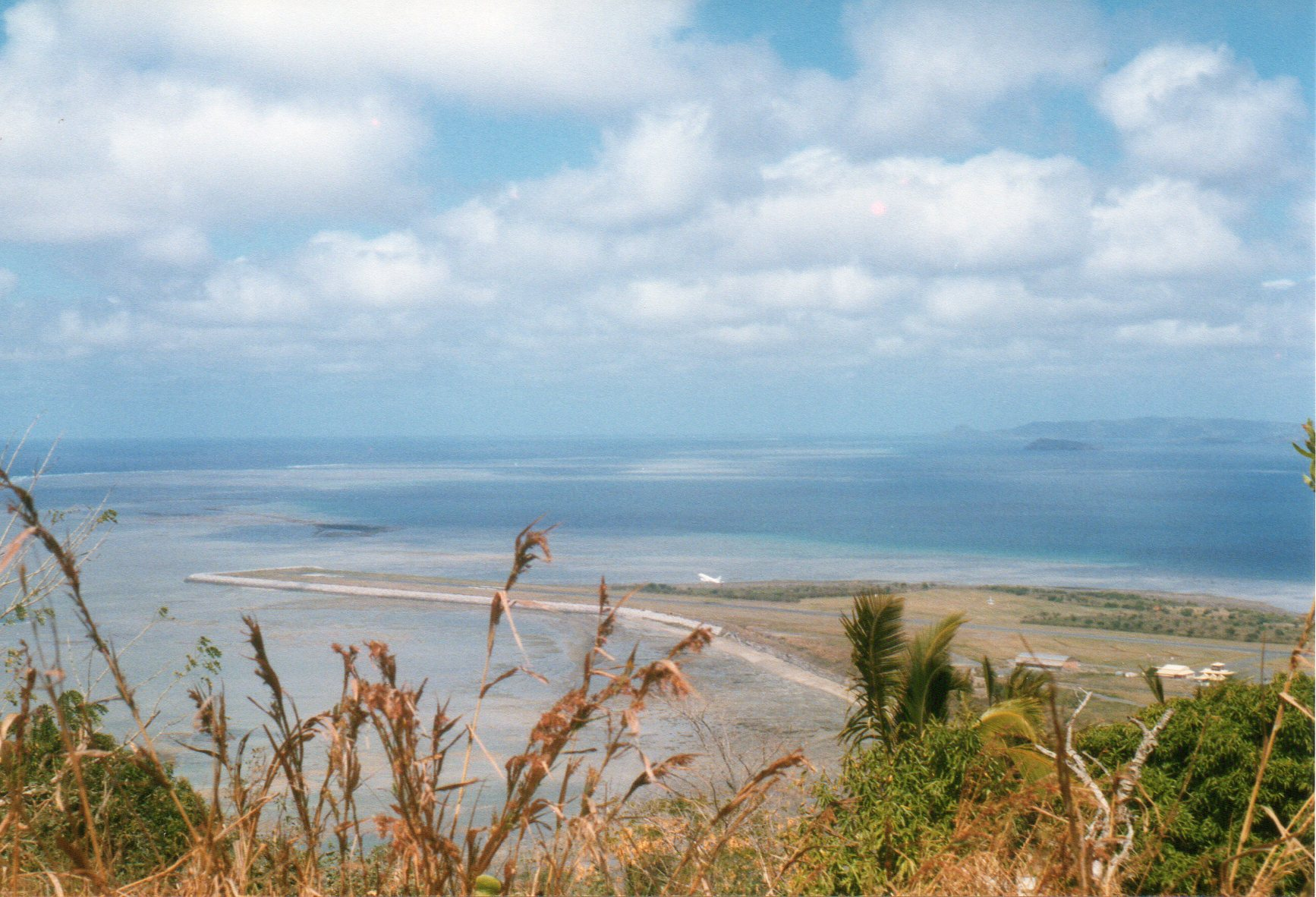 Aéroport de Pamandzi depuis la Vigie